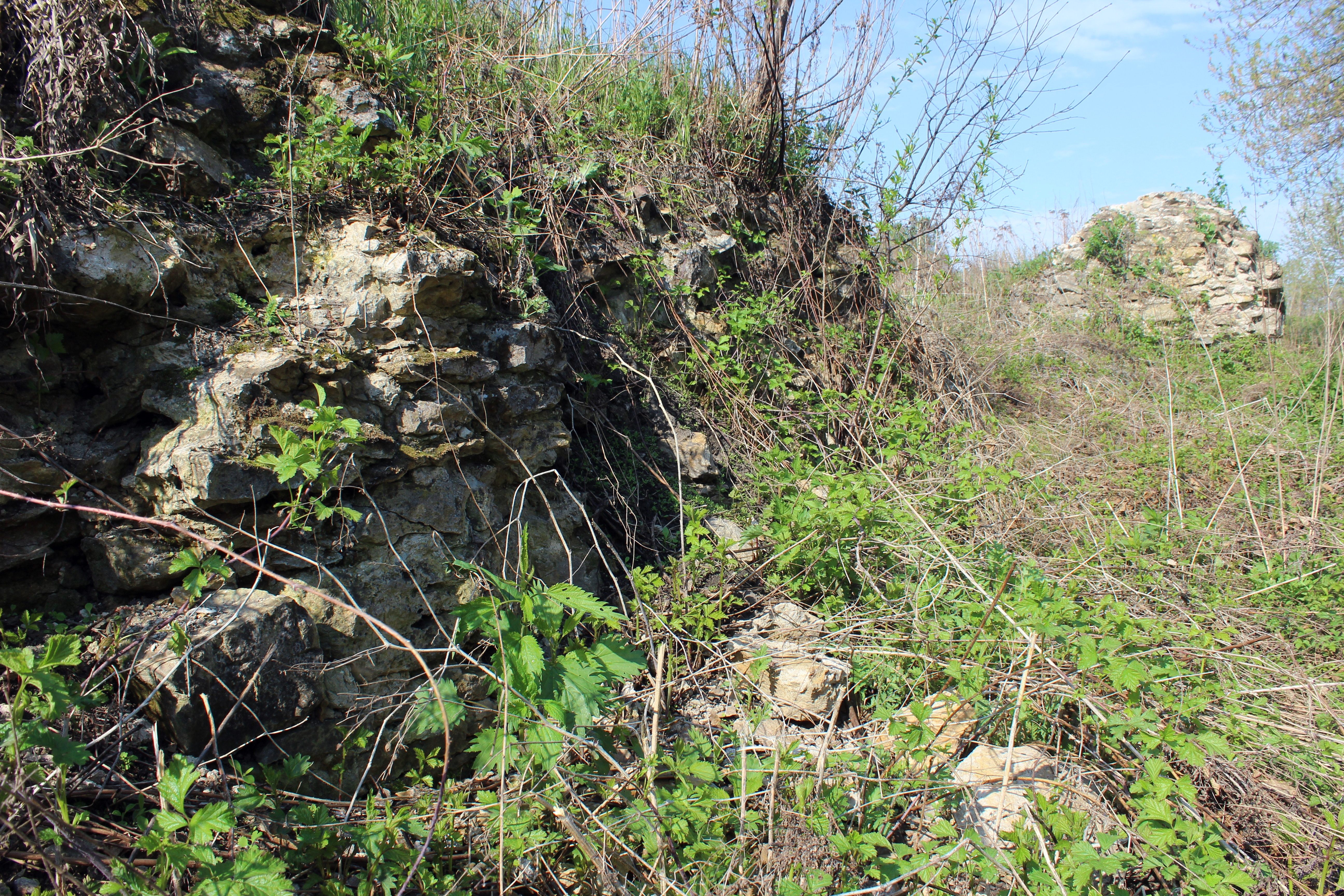 Приві́лля (колишні назви: село Асесорське — 1695 р., поселення П'ята рота — 1753 р. поселення Привільне — 1778 р.) — місто районного значення в Луганської області, підлегле Лисичанській міськраді.